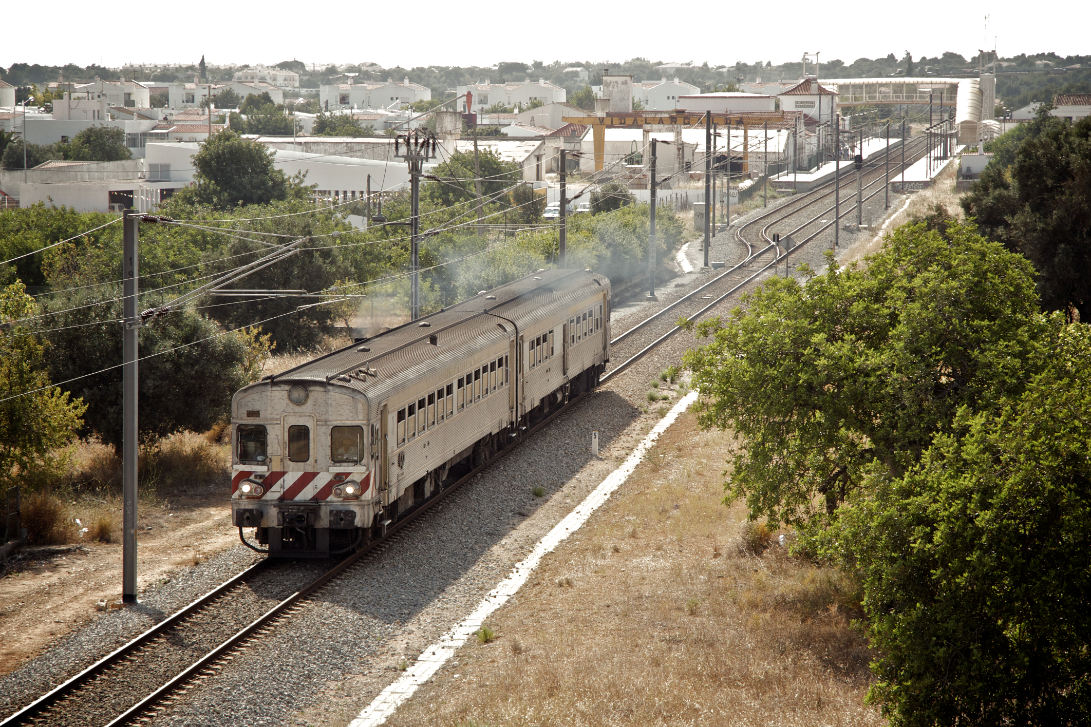 Tipo: Comboio Regional 5913 [Lagos - Faro] Local: Ferreiras [Linha do Algarve, PK 307] Data e hora: 2 de Julho de 2011 [17h39] Material: Automotora 0605 [Unidade Dupla Diesel]